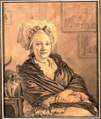 Louise Magdeleine Hortemels, femme Cochin. Assise les bras croisés, en bonnet blanc et mantelet de soie noire ; près d'elle sur une table un chat étonnant de vérité. Au second plan : Concours de la Tête d'expression de son fils et une marine d'après vernet à la gravure de laquelle elle a collaboré. Appartient en 1880 à M. de Goncourt et exposé à l'École des Beaux-Arts en 1879 D'après Le baron Roger Portalis et Henri Béraldi, Les Graveurs du dix-huitième siècle, Paris, D. Morgand et C. Fatout, 1880, 384 pages : page 496 au chapitre COCHIN Père.